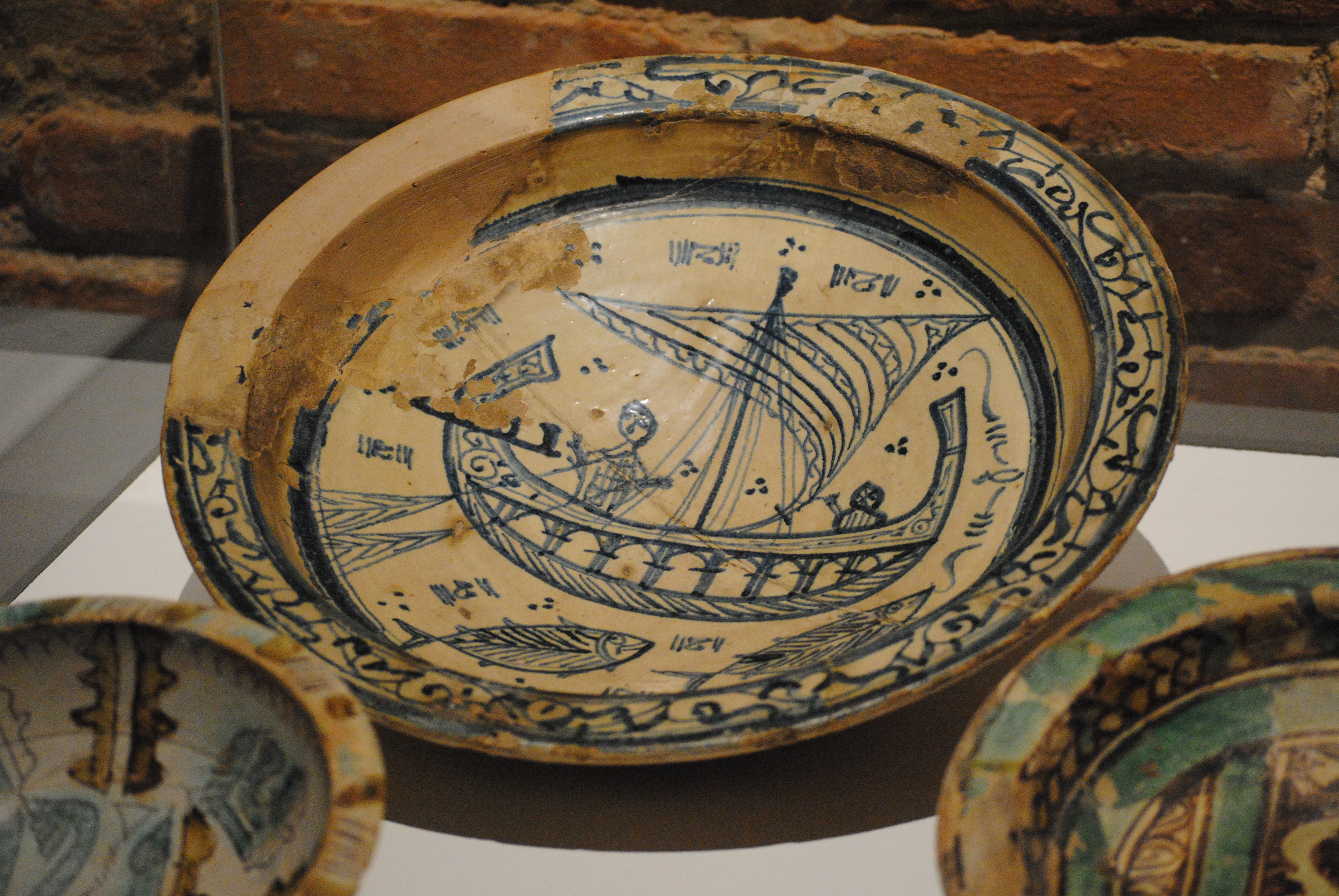 Catino in maiolica (smaltato) a cobalto e mandanese usato come bacino ceramico - importato dala Tunisia tra la fine del XII - inizi del XIII secolo (chiesa di San Michele degli Scalzi, Pisa) - Museo nazionale di San Matteo.